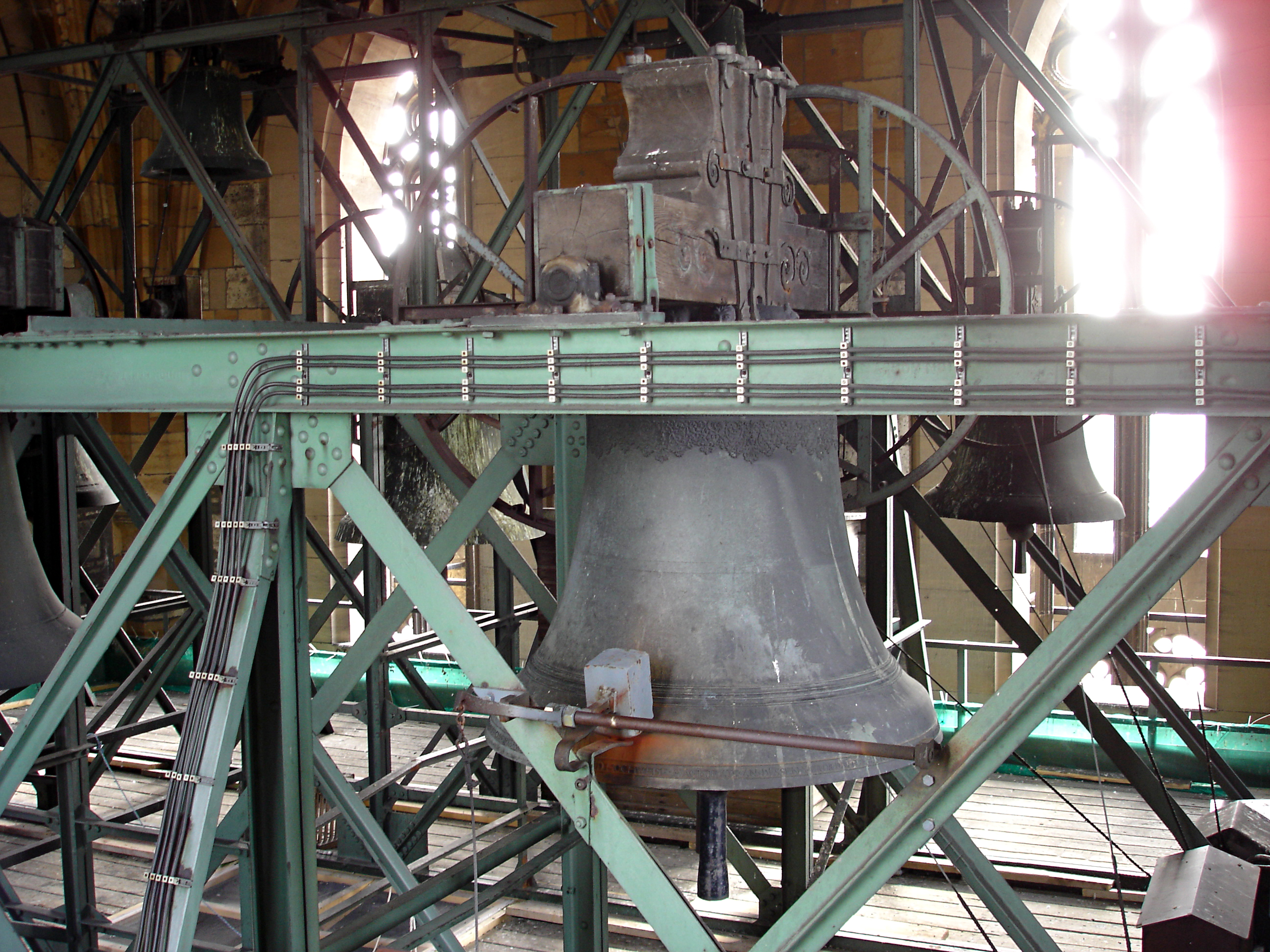 Unsanierter Glockenstuhl des Ulmer Münsters mit einigen unsanierten/noch nicht restaurierten Glocken. Ansicht vom Turmaufgang. Zu sehen: Leichenglocke (vorn), Schiedglocke (oben Mitte, teilw. sichtbar), Landfeuerglocke (hinten rechts), Kleine Betglocke (hinten Mitte), Taufglocke (oben links), Kreuzglocke (hinten links, teilw. sichtbar), Schwörglocke (vorn links, teilw. sichtbar)